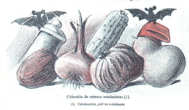 Caricatura.